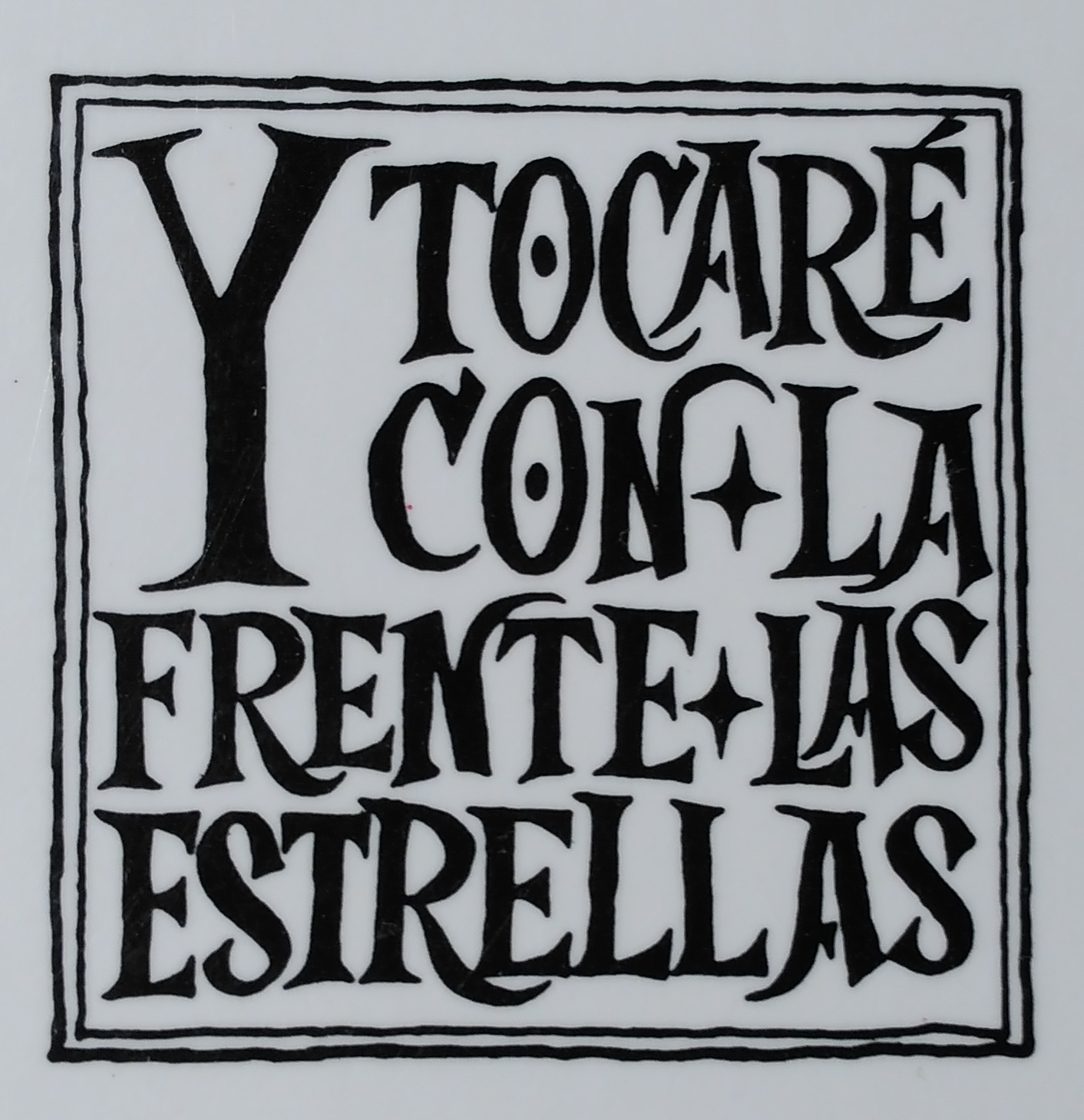 Ex-libris utilizado por el escritor Isidoro Valverde en la contraportada de sus libros.